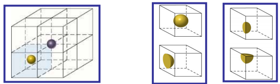 Gelaxka unitarioen partikula kopurua